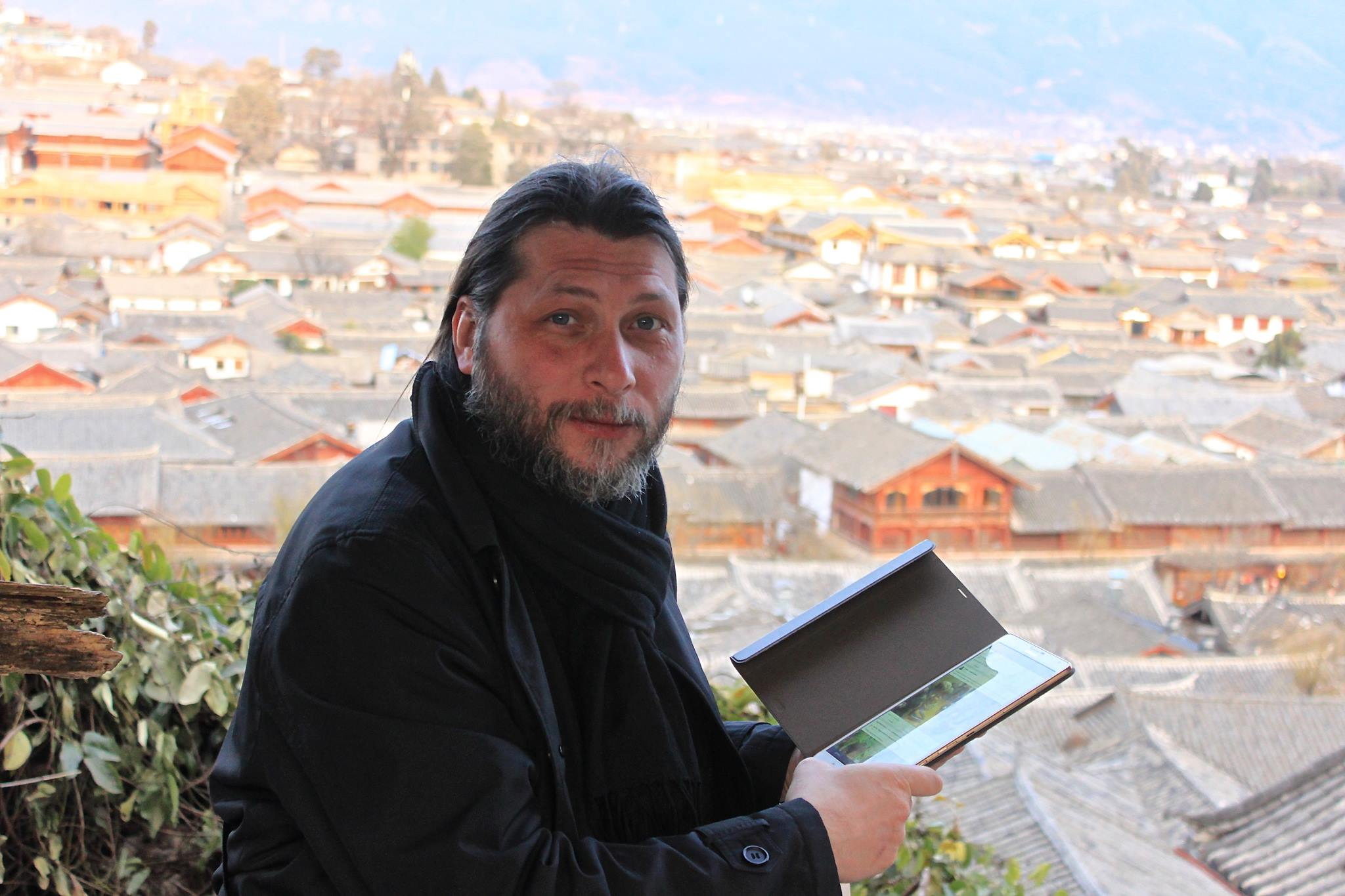 Протоиерей Дионисий (Денис) Поздняев